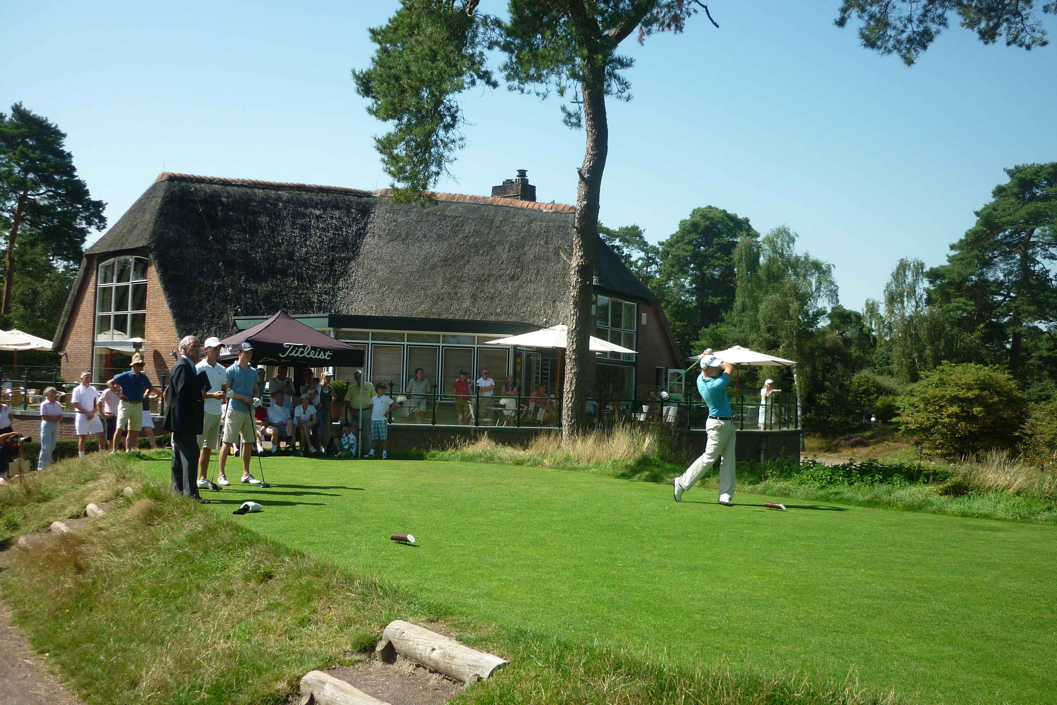 Nationaal Open 2012: de drie leiders op eerste tee: Rowin CAron, Daan Huizing (latere winnaar), Robin Kind